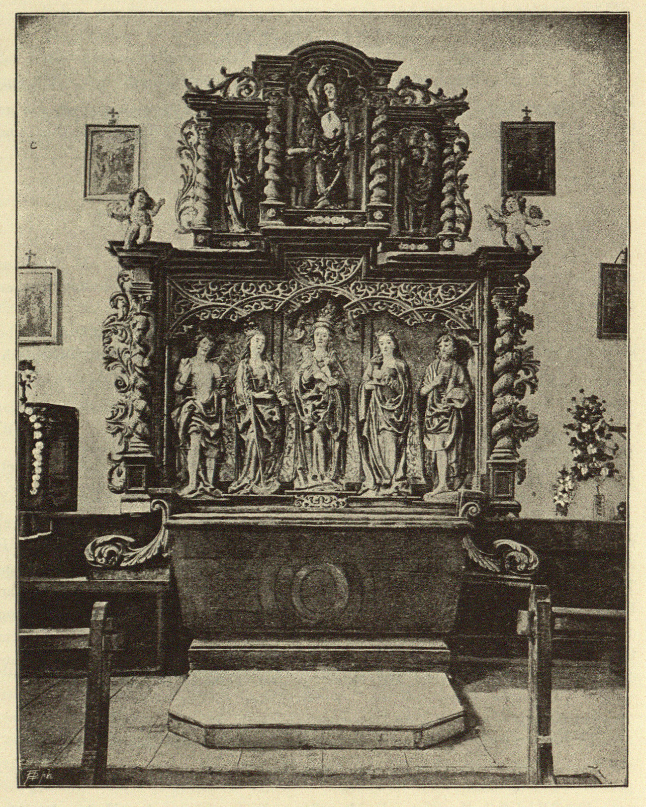 Roth, Holzschnitzaltar (Altar in St. Sebastian, Roth, heute zu Sauldorf) Bis 1831 in der Pfarrkirche zu Sauldorf, anlässlich einer Renvoierung nach Roth verbracht. 1909 an das Mannheimer Reiß-Museum verkauft. Abbildung aus: Franz Xaver Kraus: Die Kunstdenkmäler des Grossherzogthums Baden. Band 1: Die Kunstdenkmäler des Kreises Konstanz. Freiburg i. Br. 1887